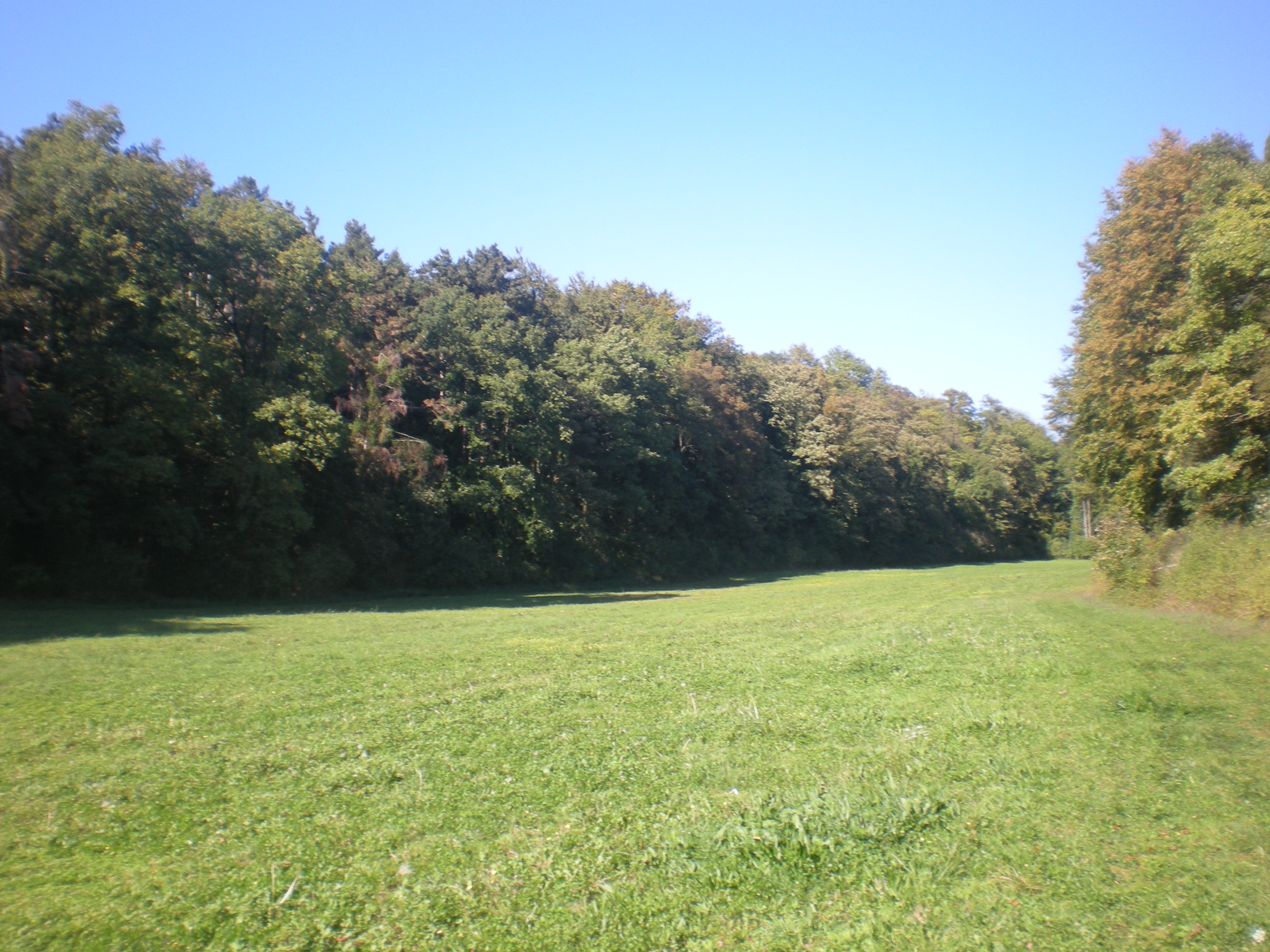 le fond des gorguets (Angy, Oise)